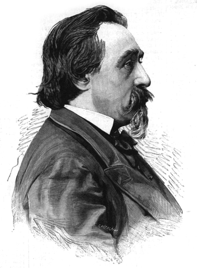 Ritratto del senatore Gaspare Finali